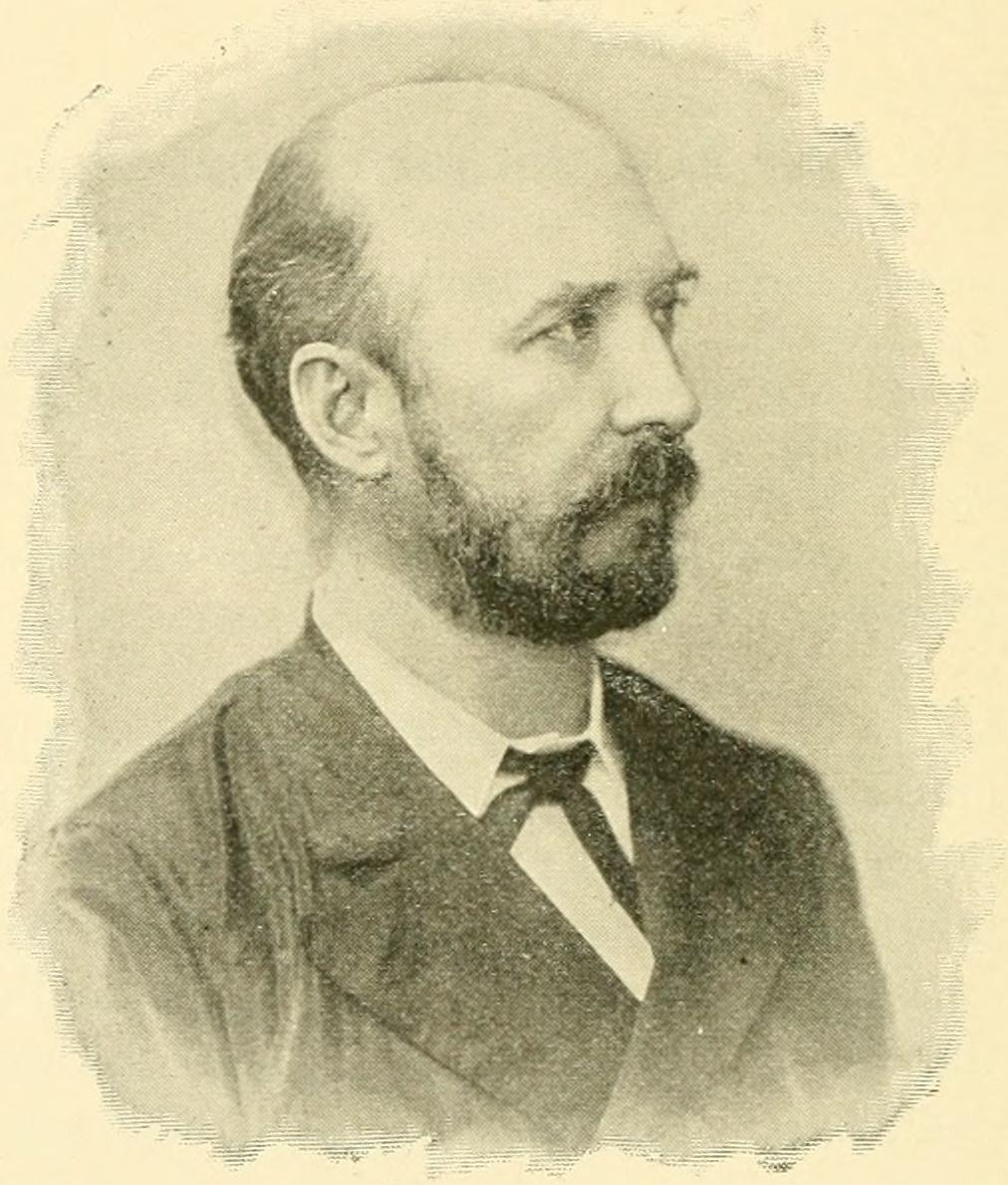 Sir Robert Hart, 1st Baronet